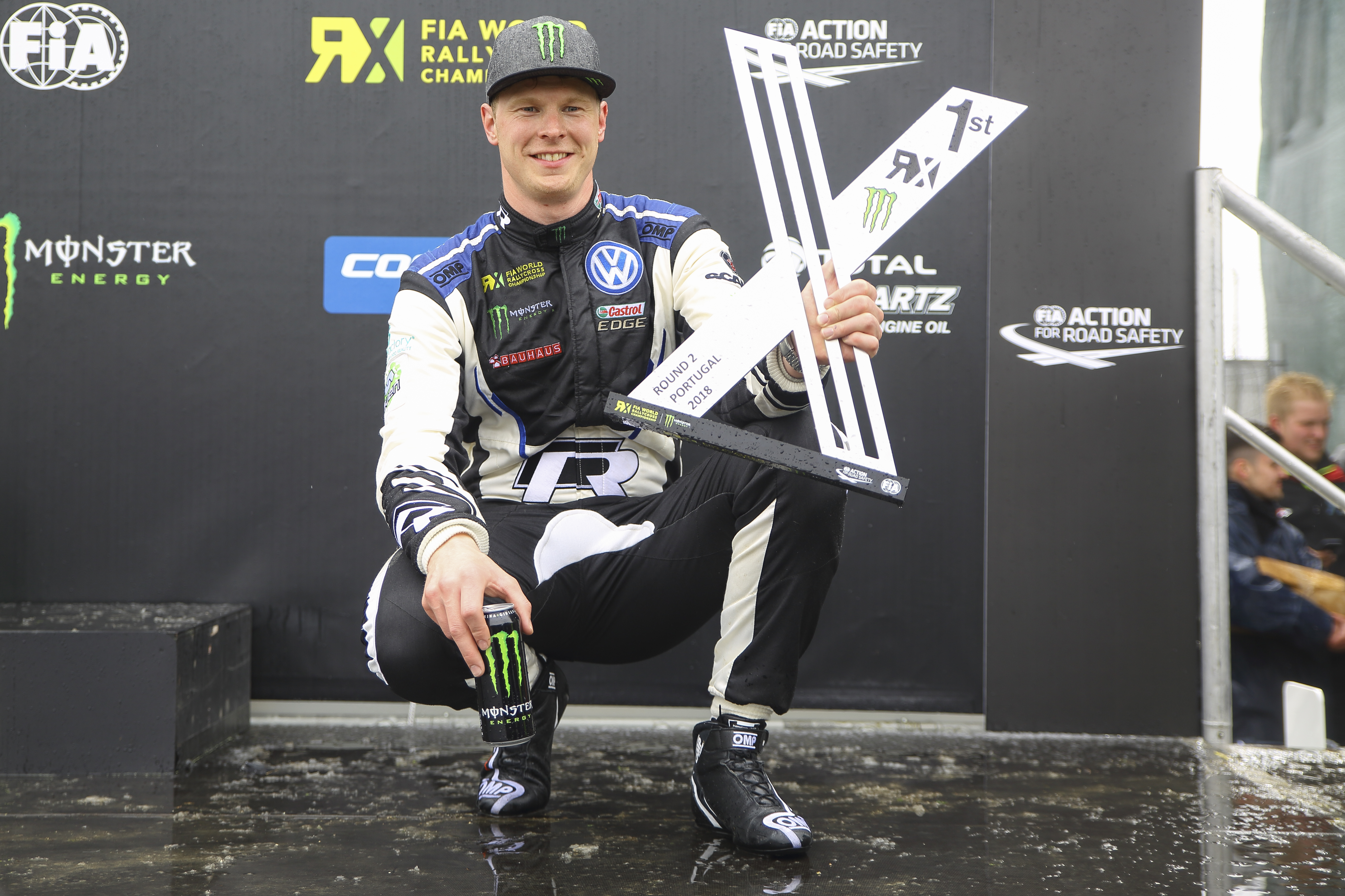 Johan Kristofferssonganó en la final en Portugal, tras hacerlo en España, el Sueco se afianza en el liderato provisional del Campeonato. Sin embargo no fue el mejor en las mangas de entrenamiento que fueron dominadas por Andreas Bakkerud.